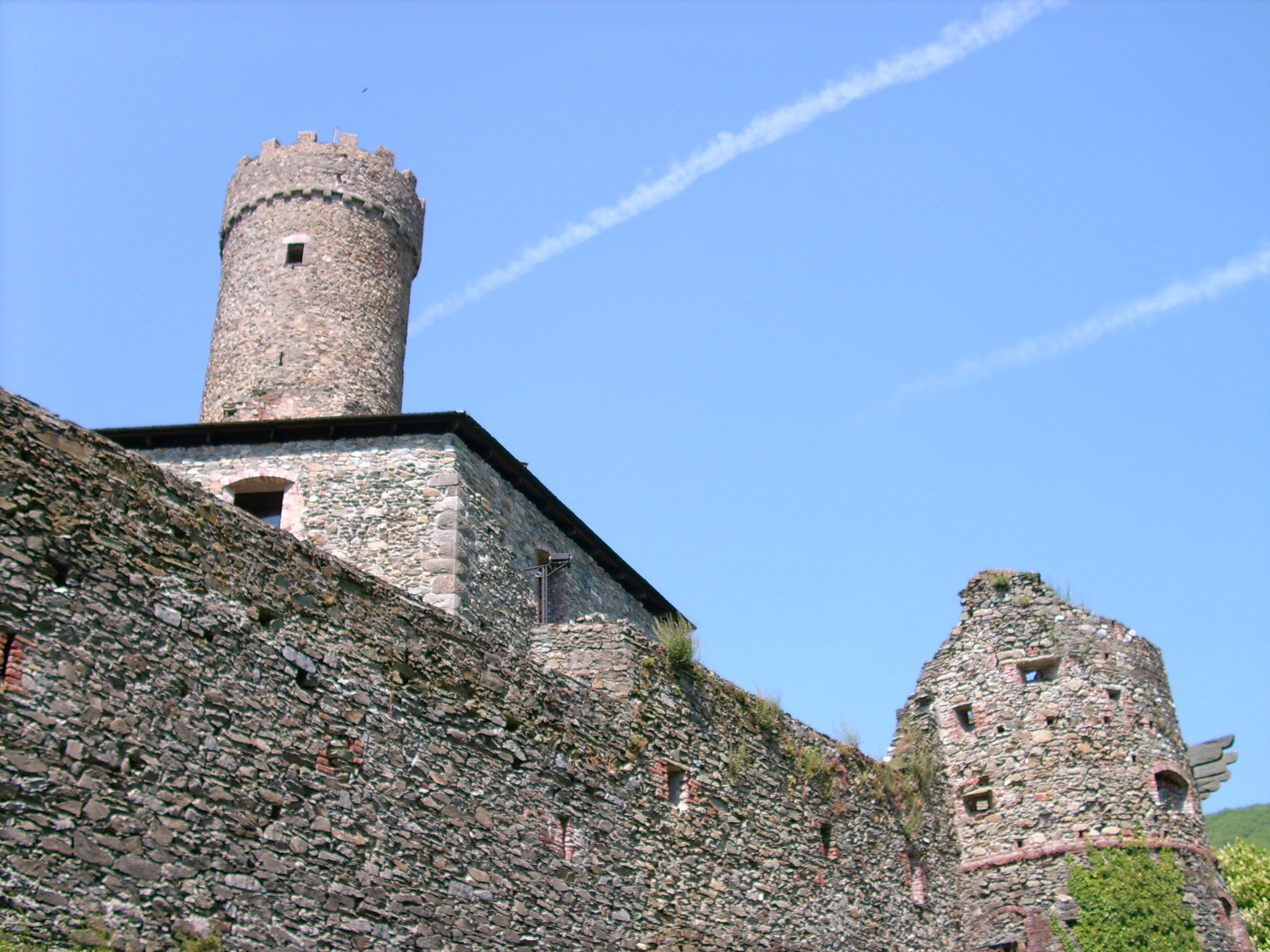 Castello Spinola di Campo Ligure, Liguria, Italia